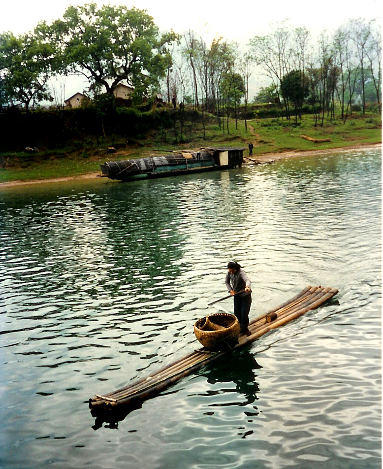 Guilin: Guilin a Li (Floss).